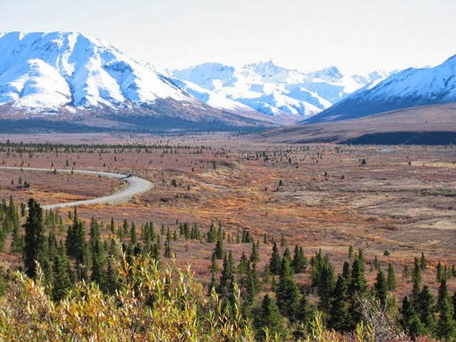 Аляска , Национальный парк Денали